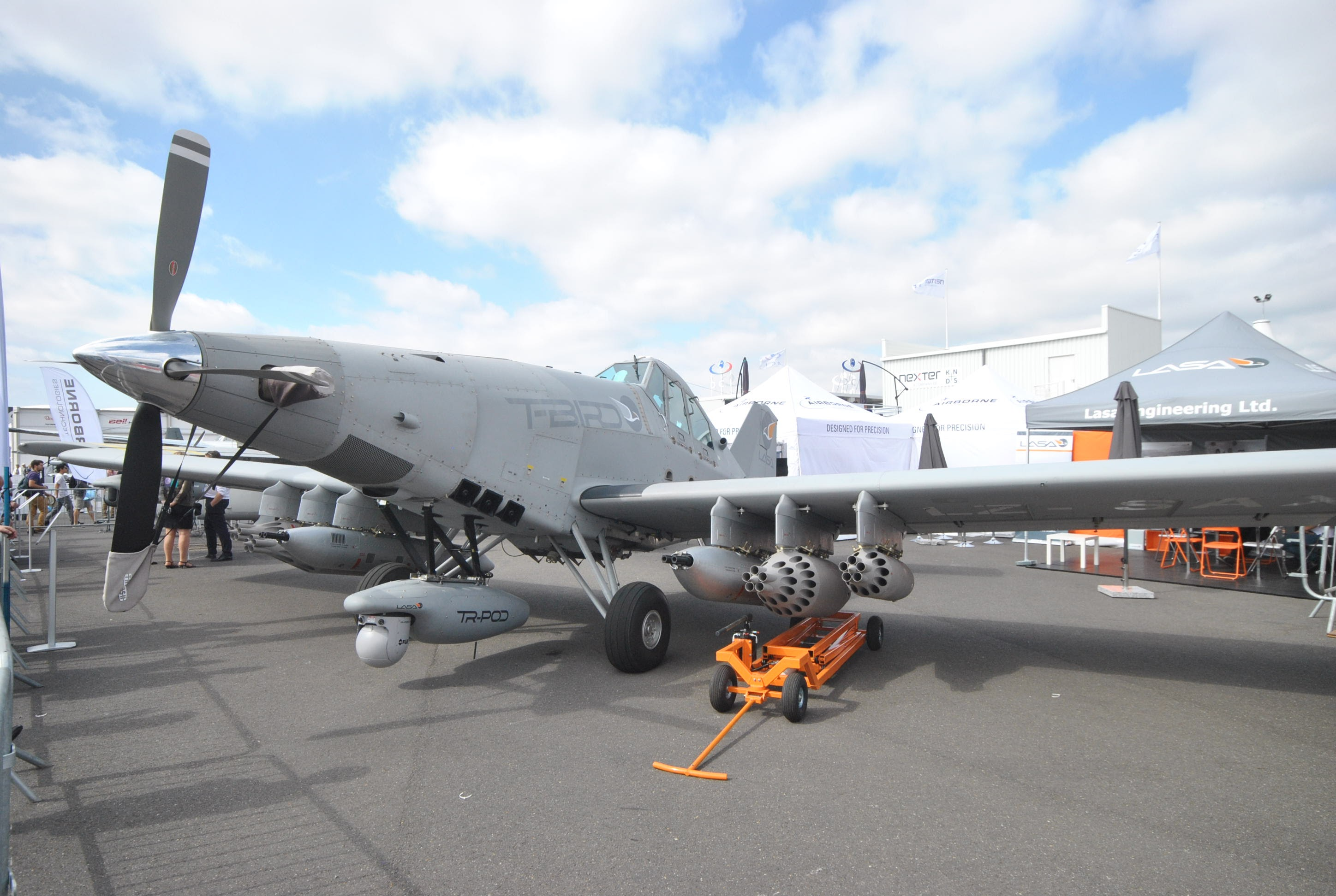 Paris Air Show 2017 Lasa Thrush 510G